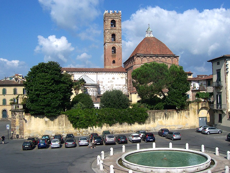 Lucca - Piazza Antelminelli e la Chiesa dei Ss. Giovanni e Reparata